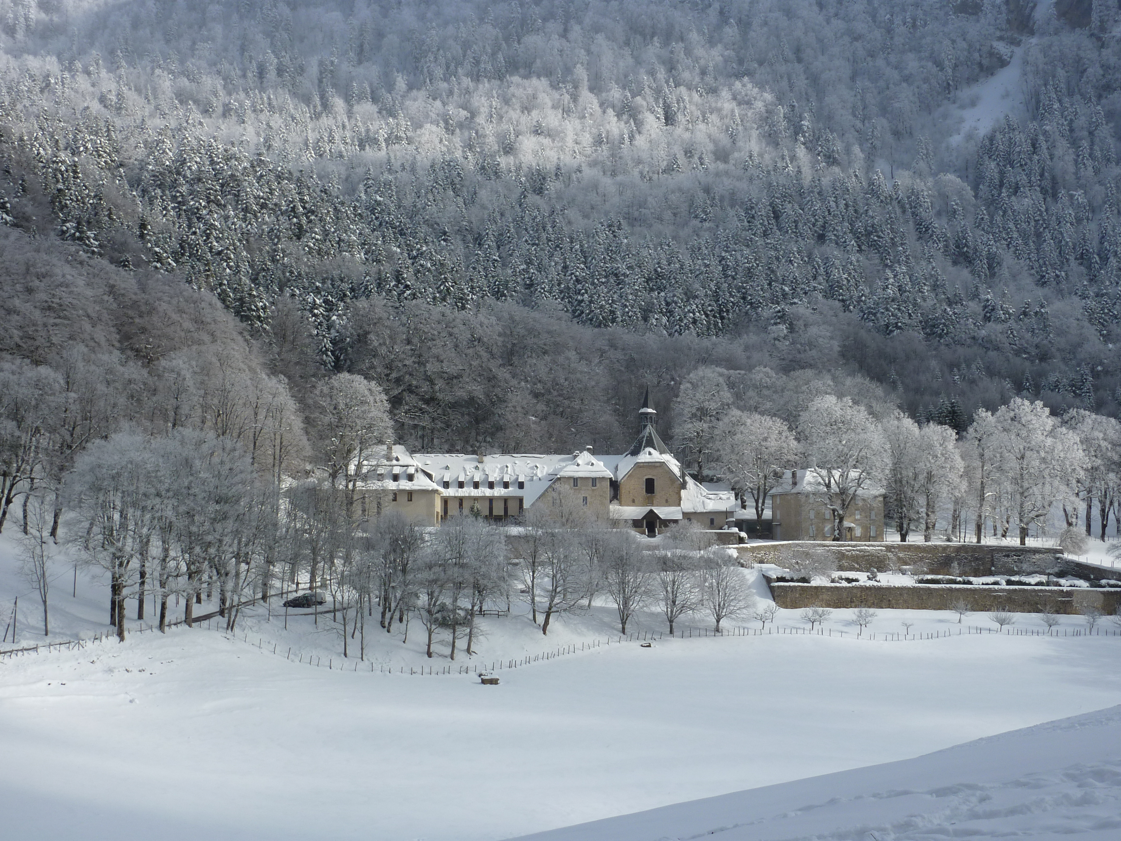 Abbaye de Chalais sous la neige, Voreppe, France